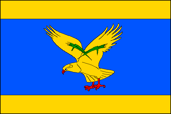 vlajka, Prosenice, okres Přerov